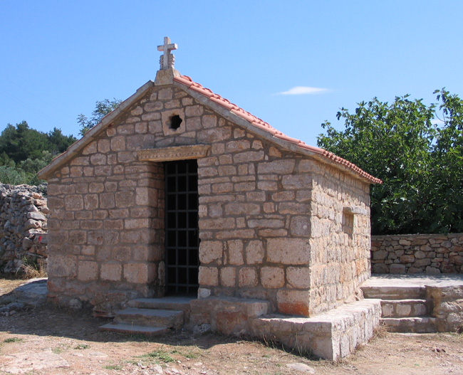 kapela Gospojica, Stari Grad, Hvar